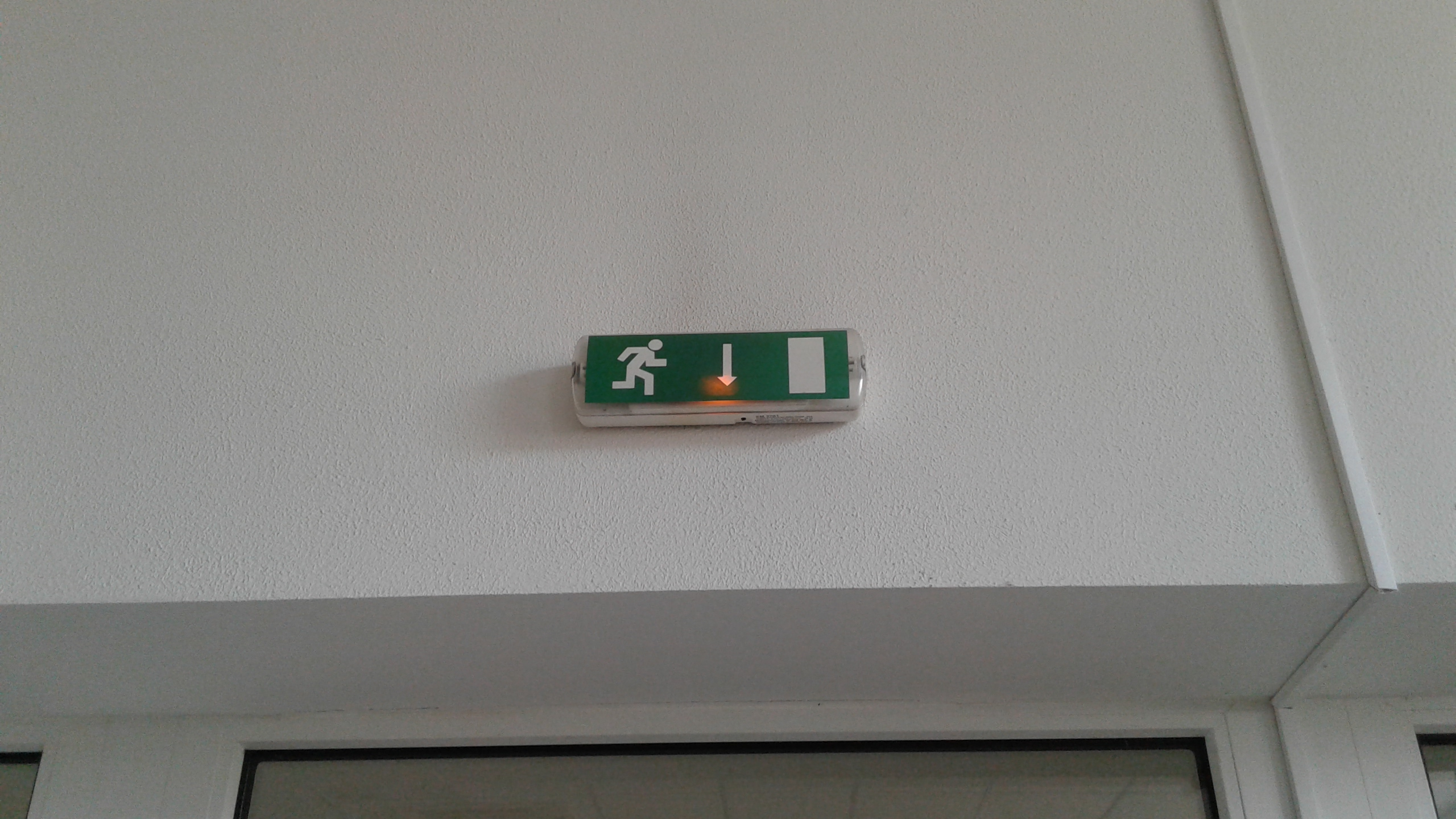 Евакуаційне світло